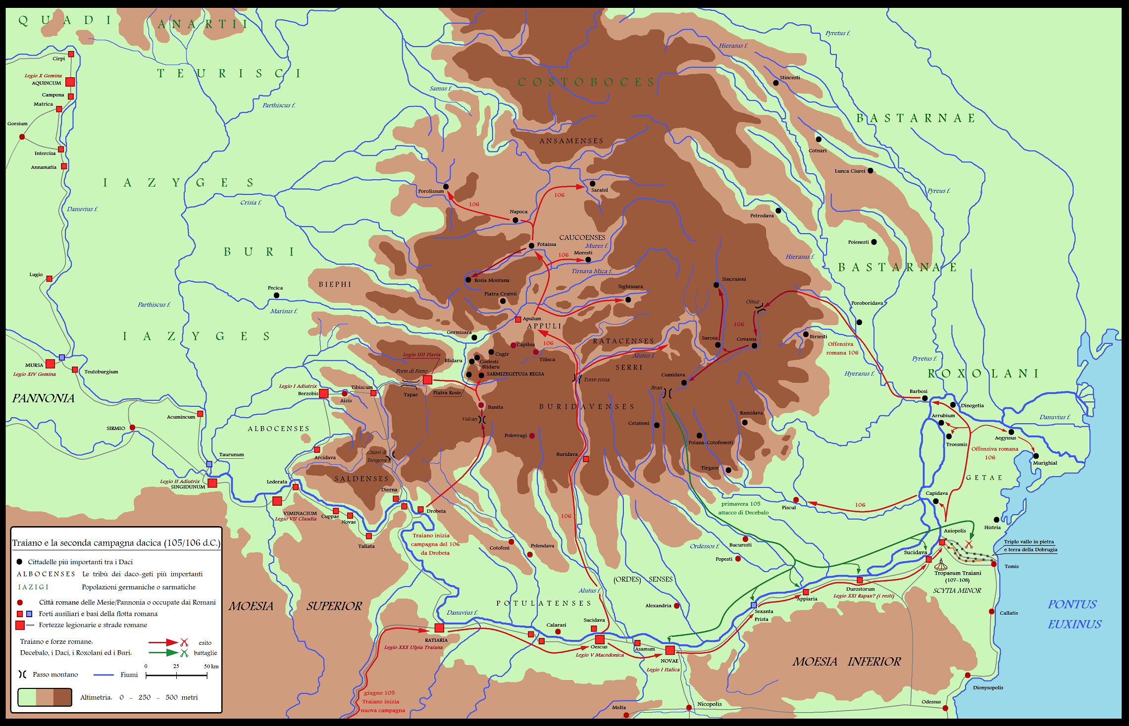 La Dacia durante la secunda expeditio dacica di Traiano nel 105/106 d.C.